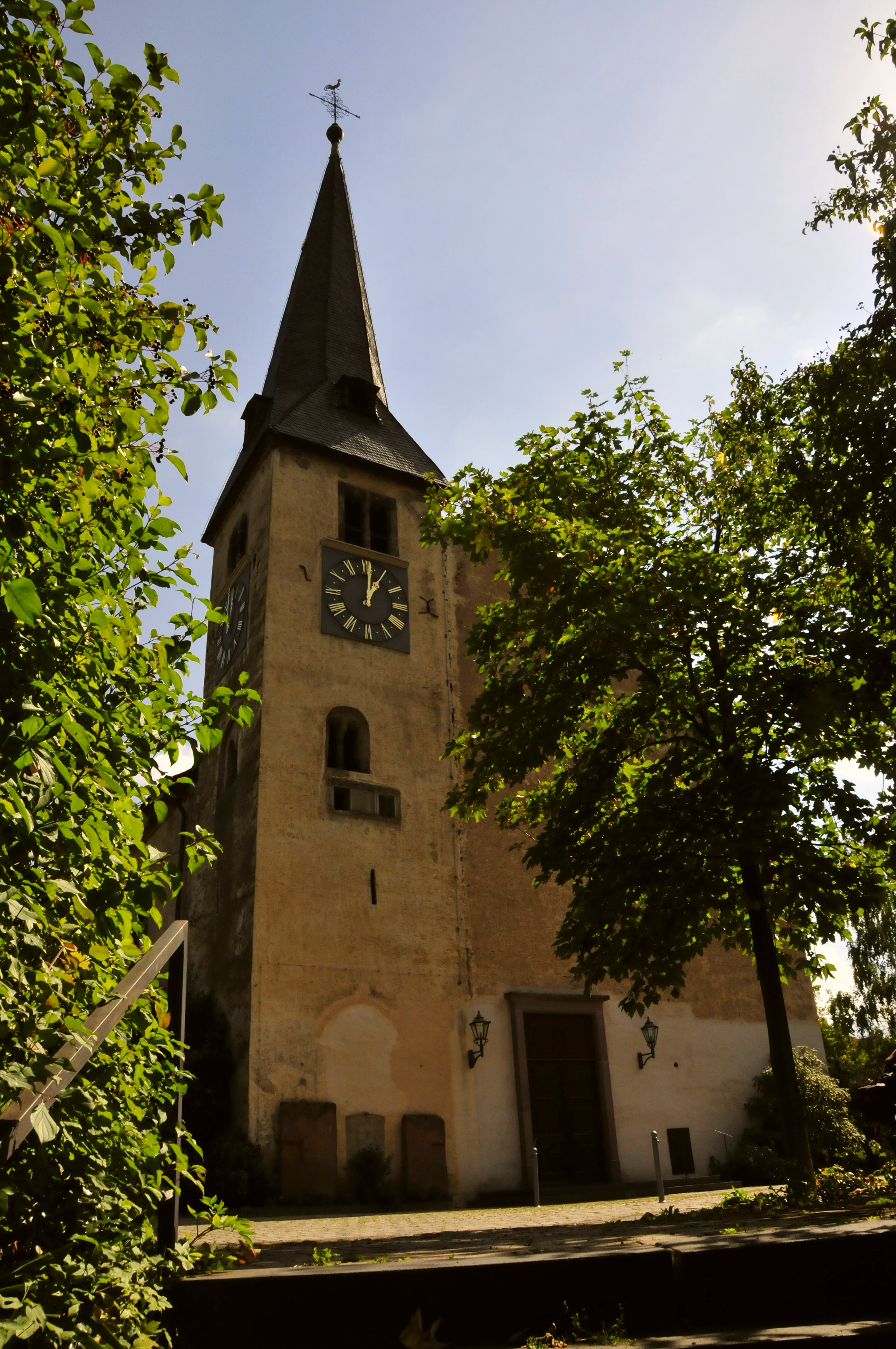 Neumagen, St.-Marien-Kirche